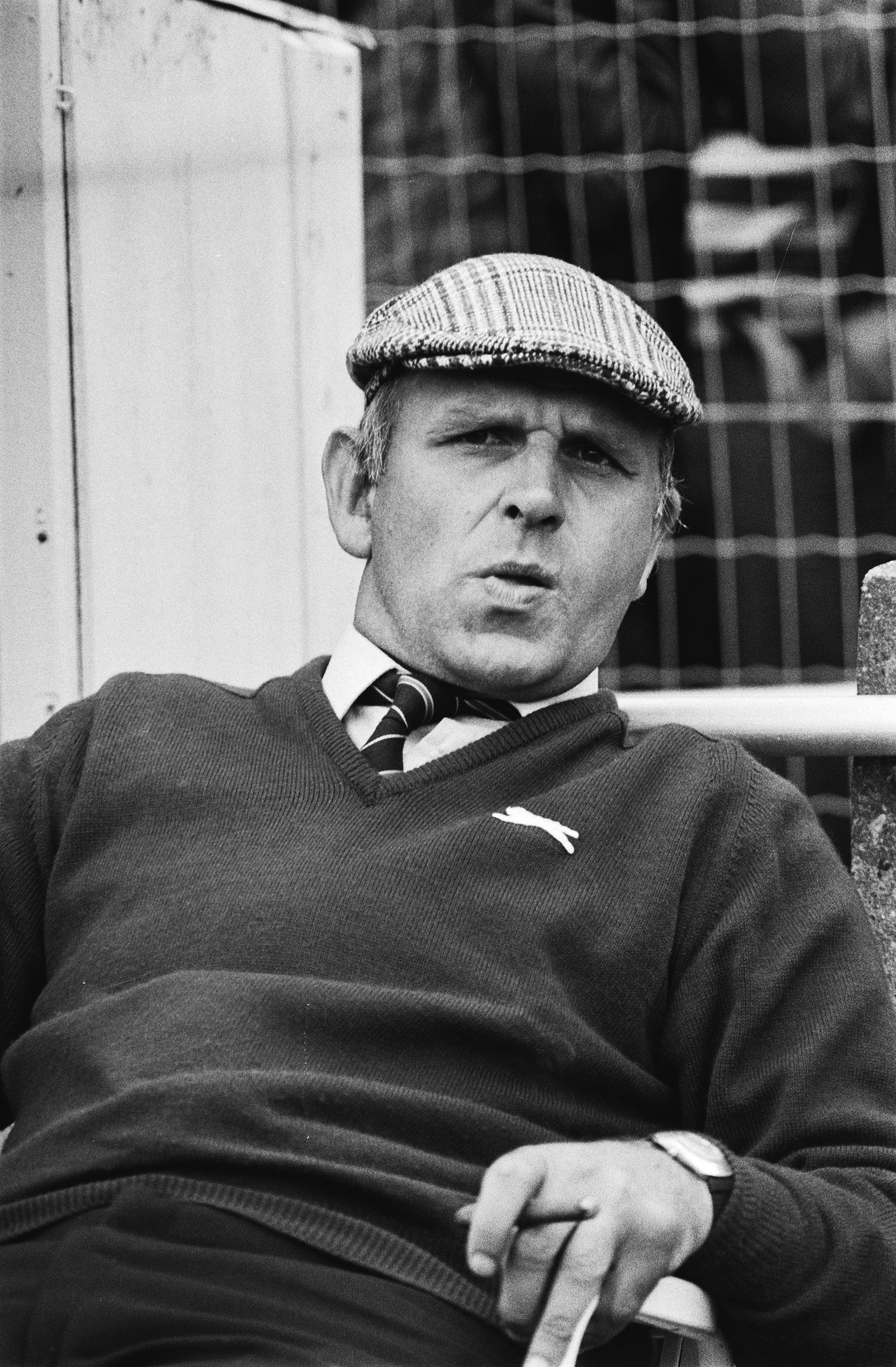 Collectie / Archief : Fotocollectie Anefo Reportage / Serie : Sparta tegen Feyenoord 1-2 Beschrijving : Sparta-trainer Barry Hughes Datum : 24 augustus 1980 Locatie : Rotterdam, Zuid-Holland Trefwoorden : portretten, sport, trainers, voetbal Persoonsnaam : Hughes, Barry Fotograaf : Dijk, Hans van / Anefo Auteursrechthebbende : Nationaal Archief Materiaalsoort : Negatief (zwart/wit) Nummer archiefinventaris : bekijk toegang 2.24.01.05 Bestanddeelnummer : 930-9802